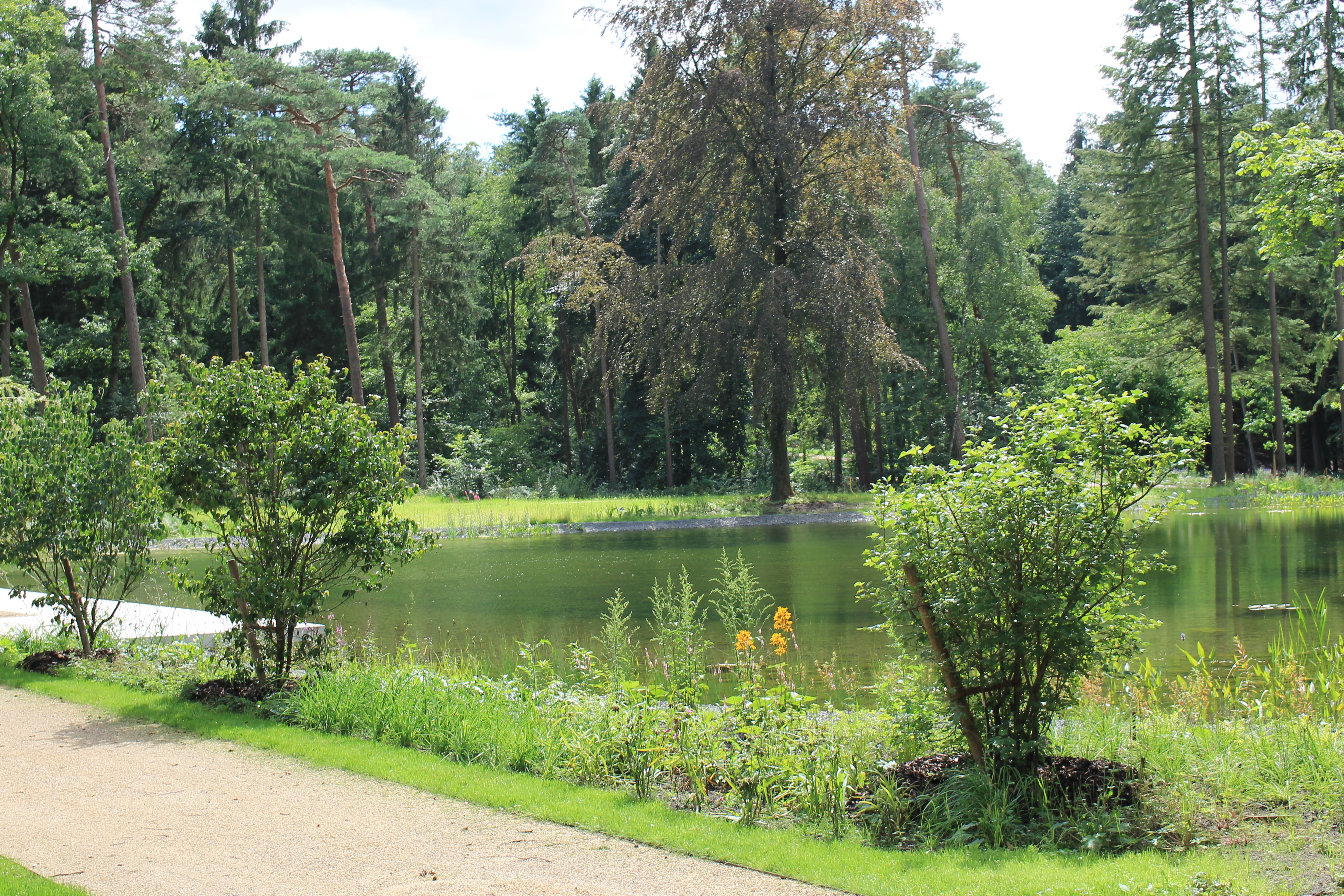 Der Waldpark in Bad Lippspringe, hier fand 2017 die Landesgartenschau NRW statt